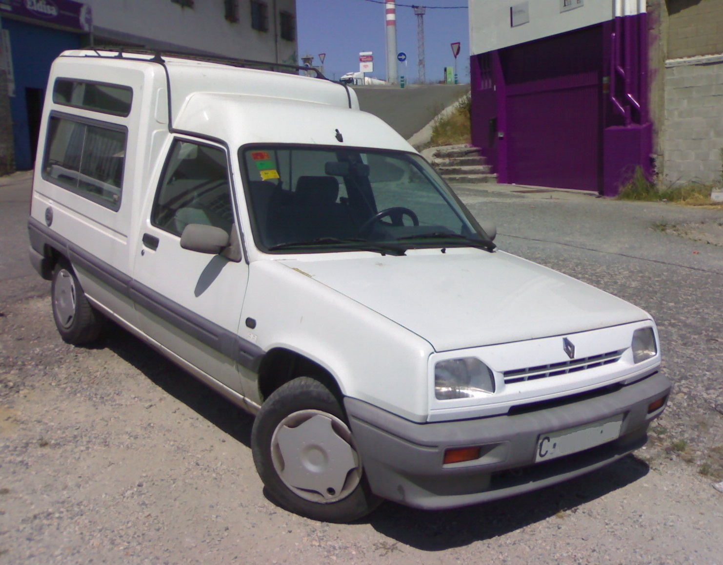 Vista frontal de una furgoneta Renault Express con portón trasero.